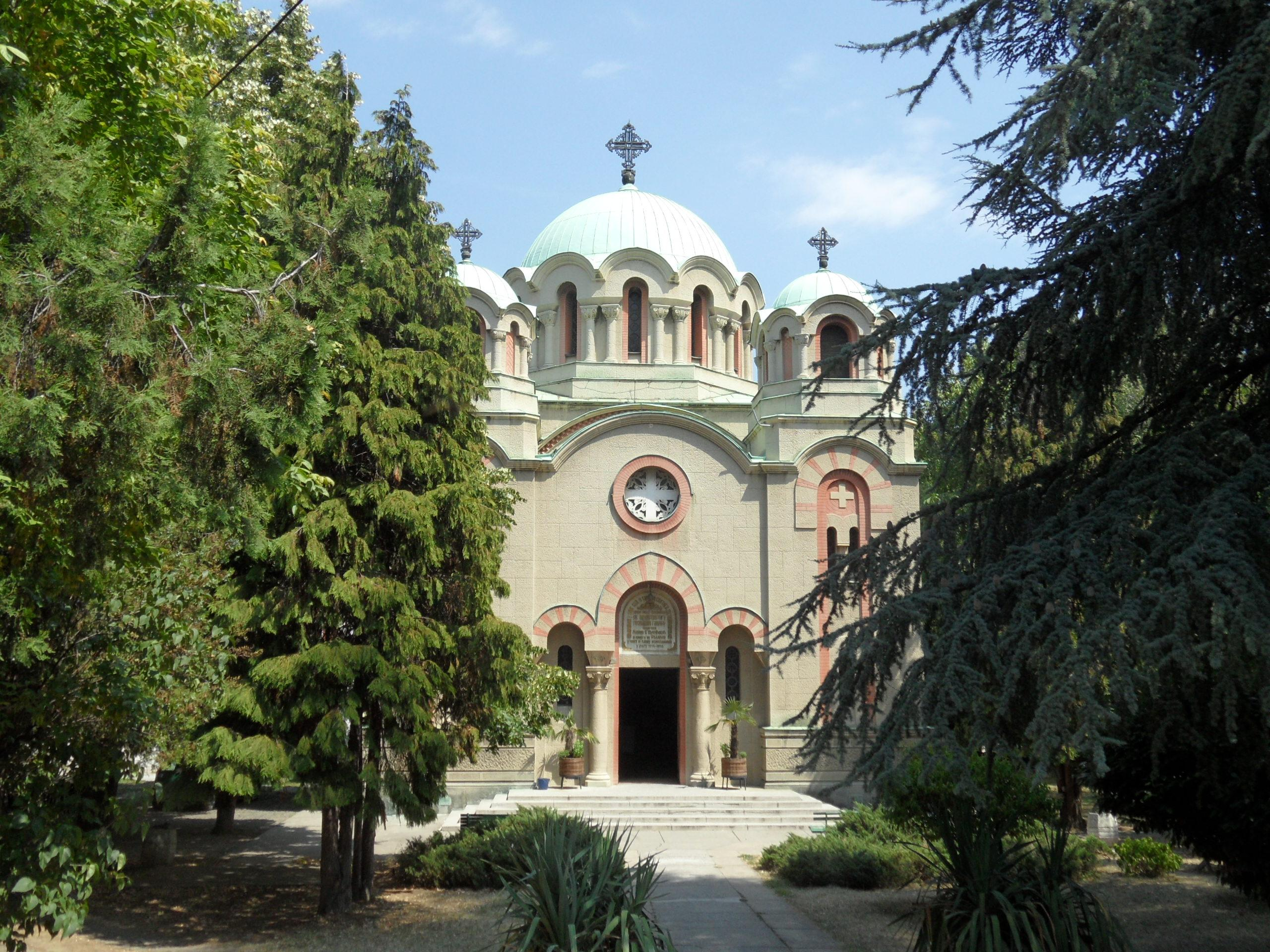 Beograd: Crkva Sv. Arhanđela Gavrila u Progaru